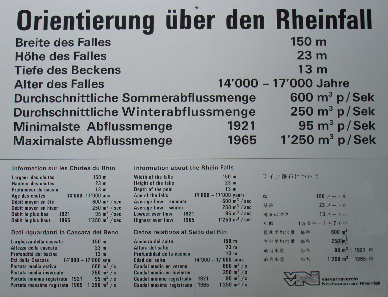 Informationstafel am Rheinfall in Schaffhausen